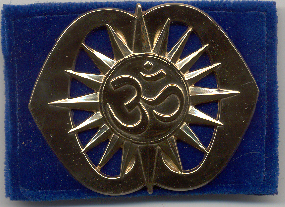 geestelijk verzorger vanuit de hindoeïstische levensbeschouwing